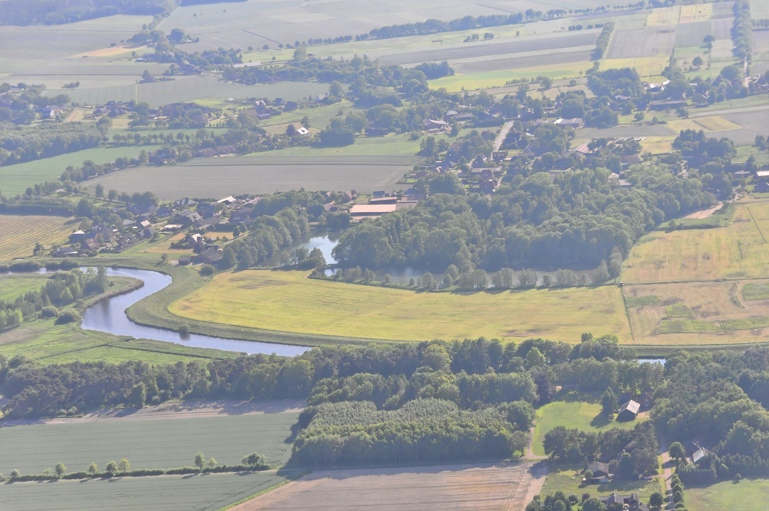 Überführungsflug vom Flugplatz Nordholz-Spieka über Lüneburg, Potsdam zum Flugplatz Schwarzheide-Schipkau